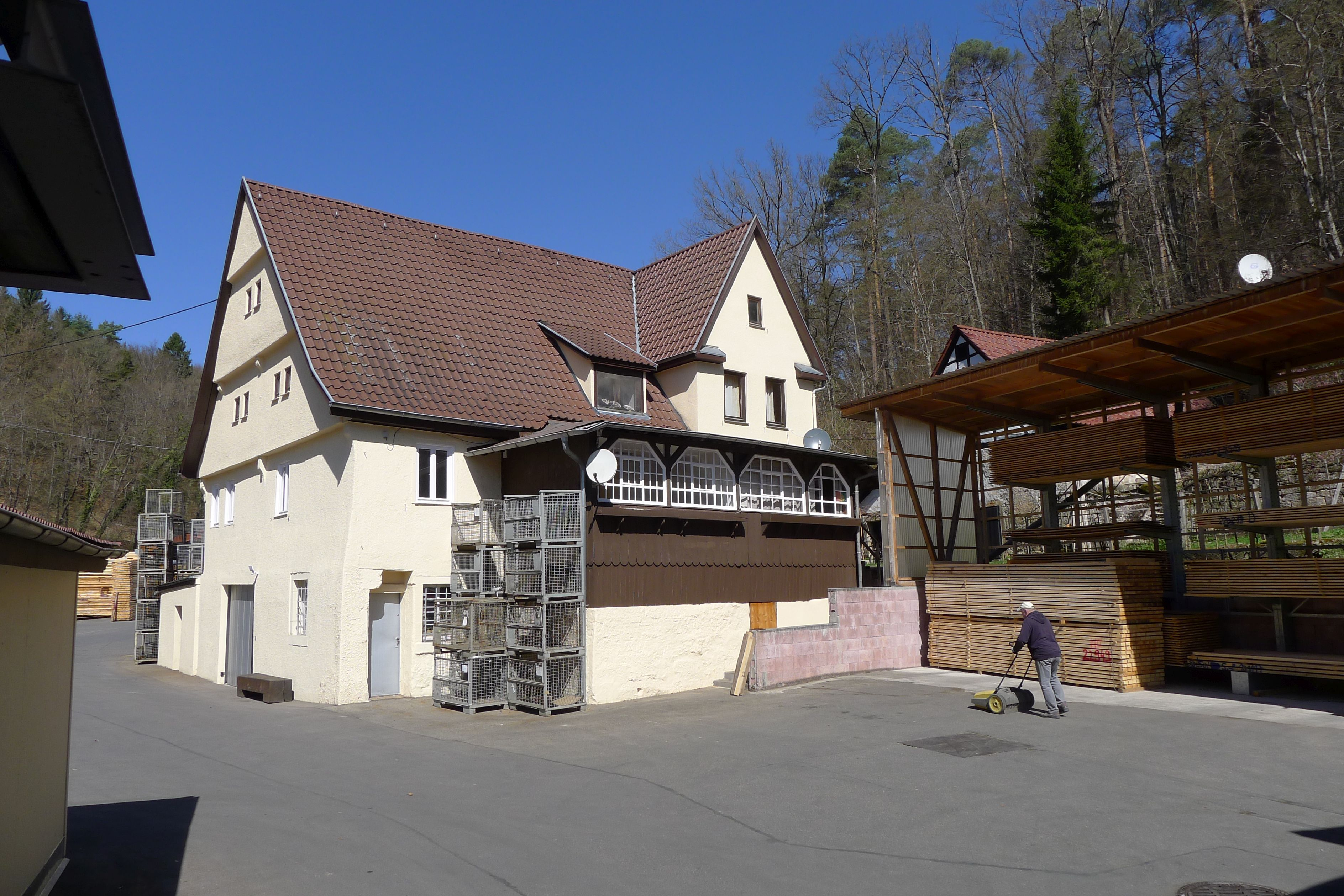 Het oude gebouw van de Untere Kleinmichelesmühle is geheel ingebouwd door houthandel Holzland Filderstadt